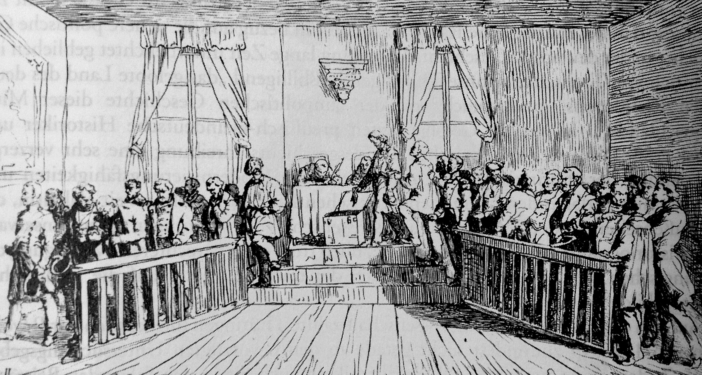 Urwahl 1848, Thüringen.